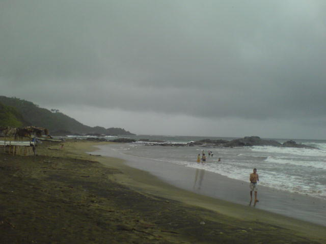 Playa "La barrita",Petatlán Guerrero (México).